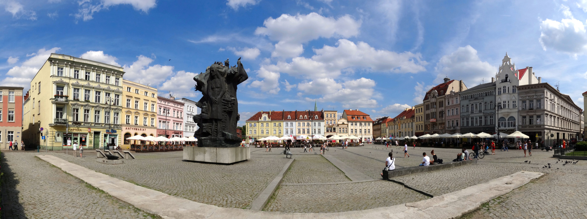 Stary Rynek w Bydgoszczy - zdjęcie panoramiczne